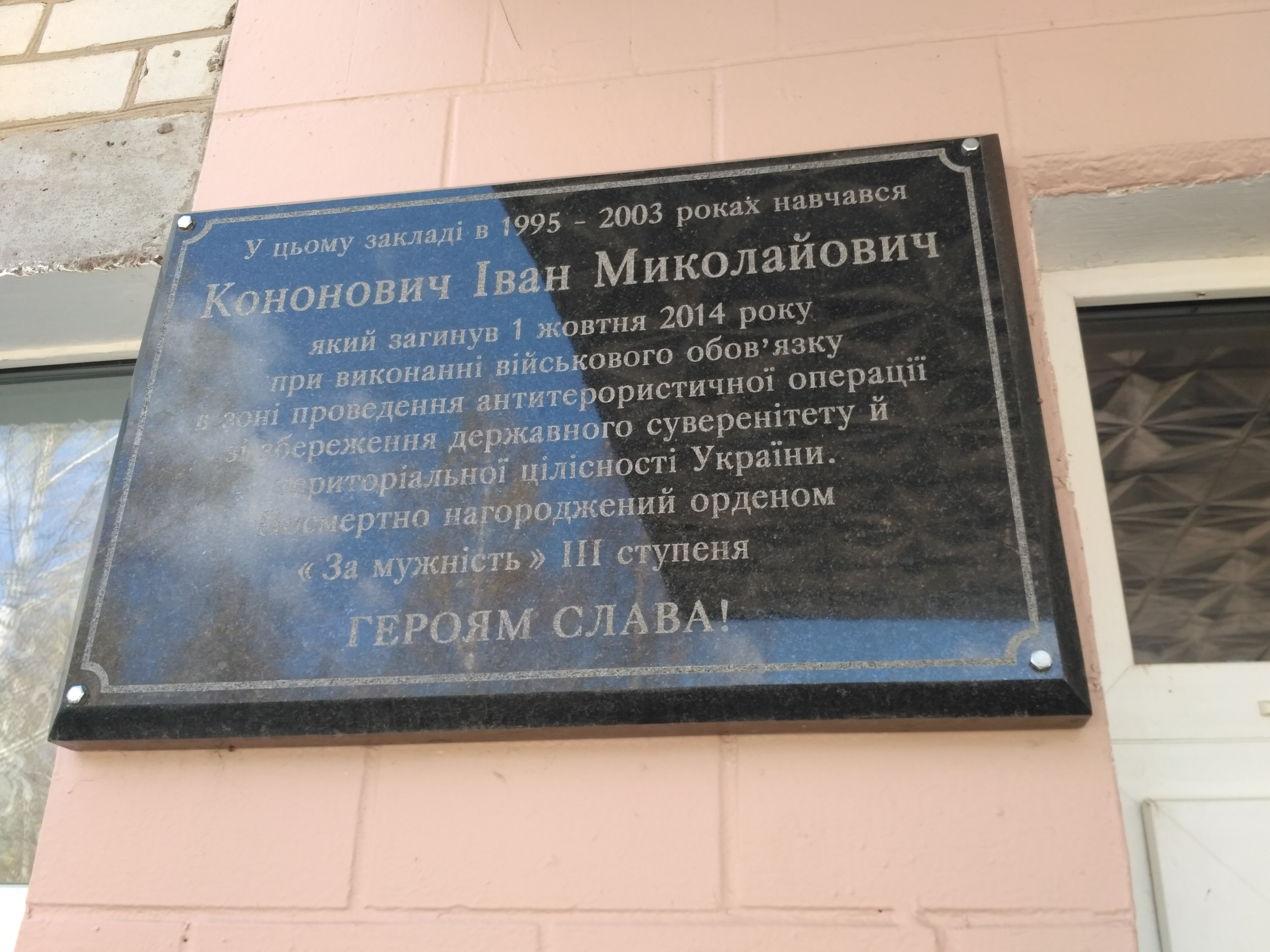 Памятная доска Ивану Кононовичу в Чернигове.